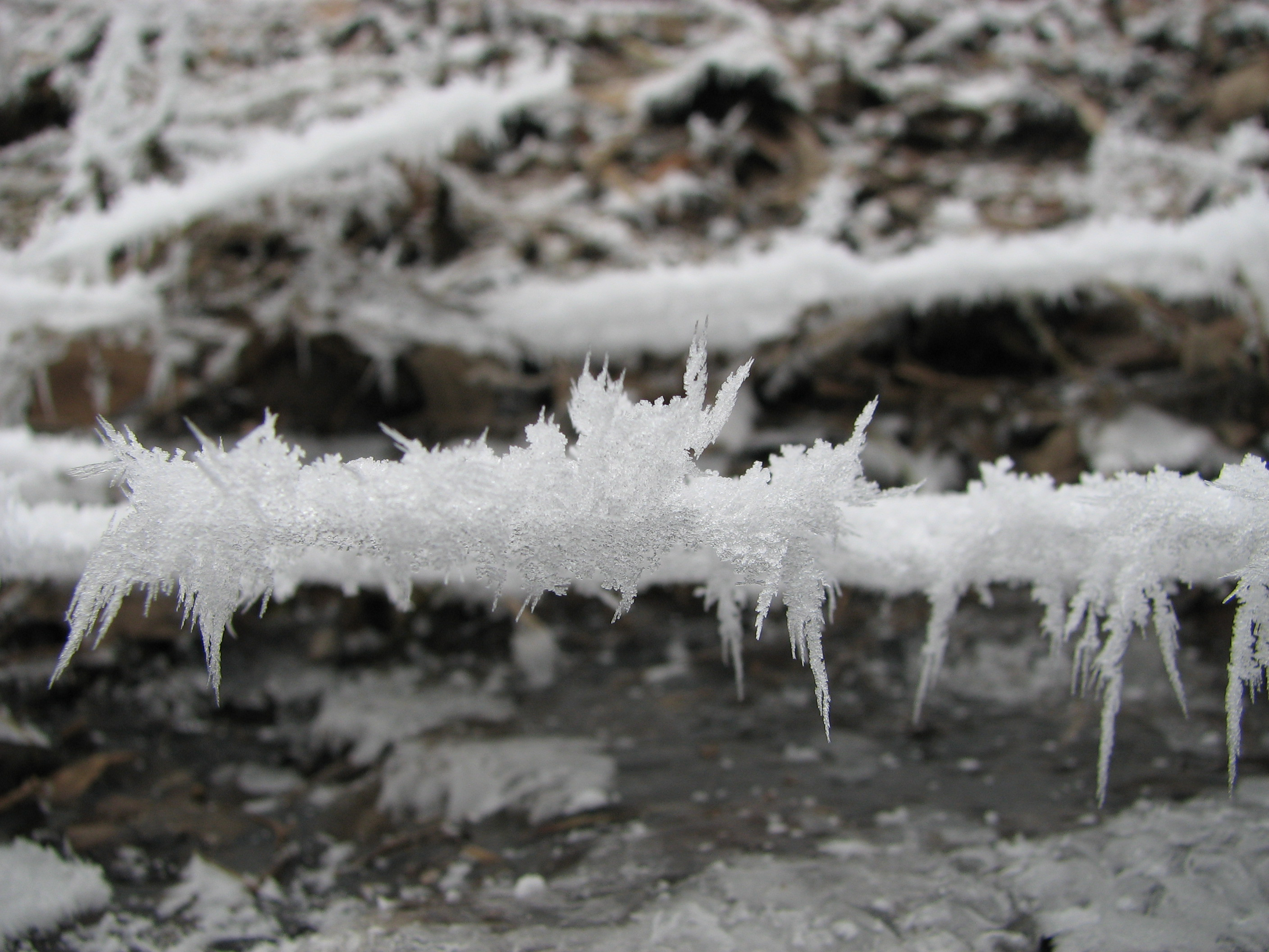 Phénomène de cristallisation des eaux de la Lauch à hauteur de Herrlisheim près de Colmar